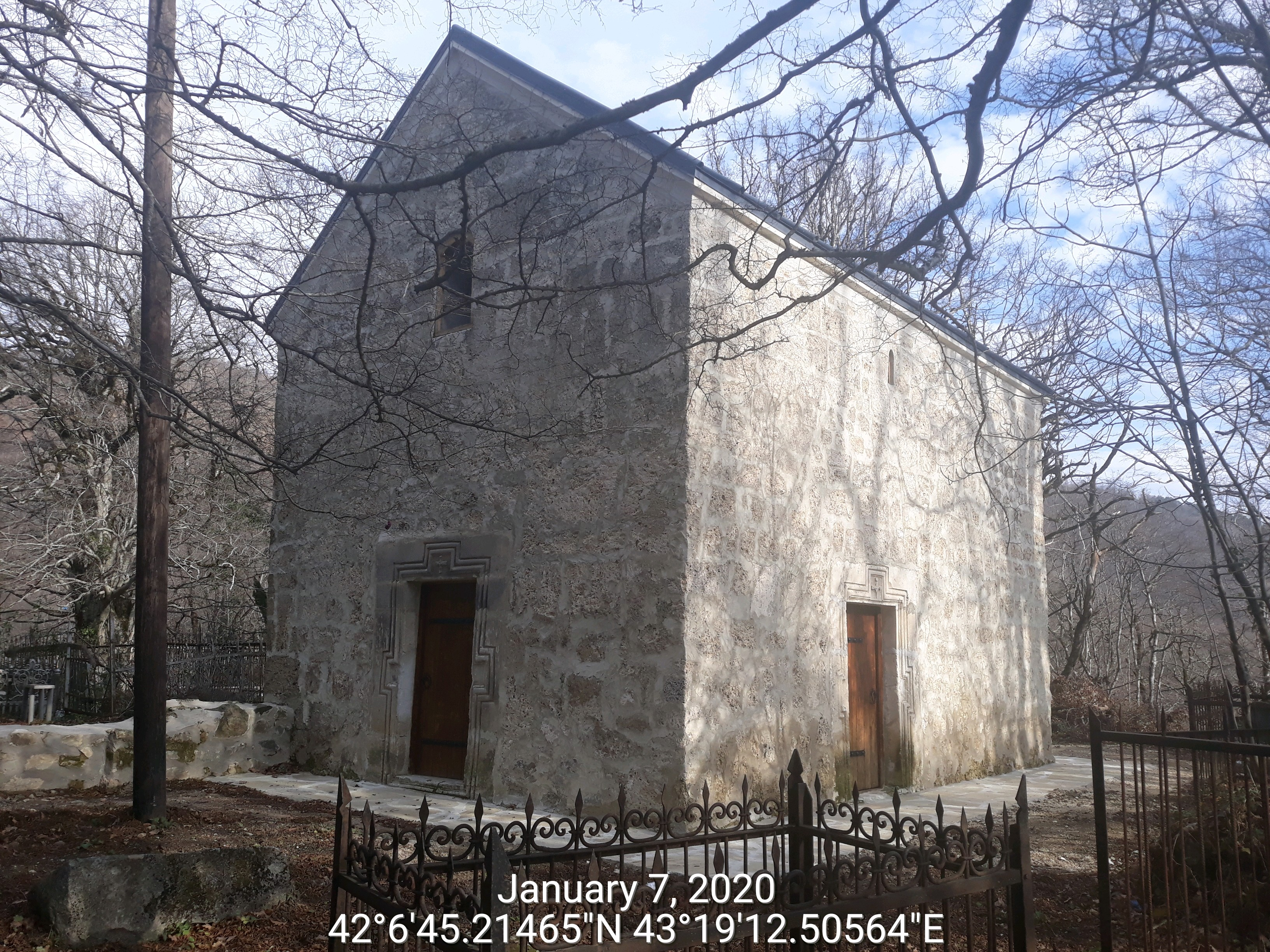 ვერტყვილას წმინდა გიორგის ეკლესია